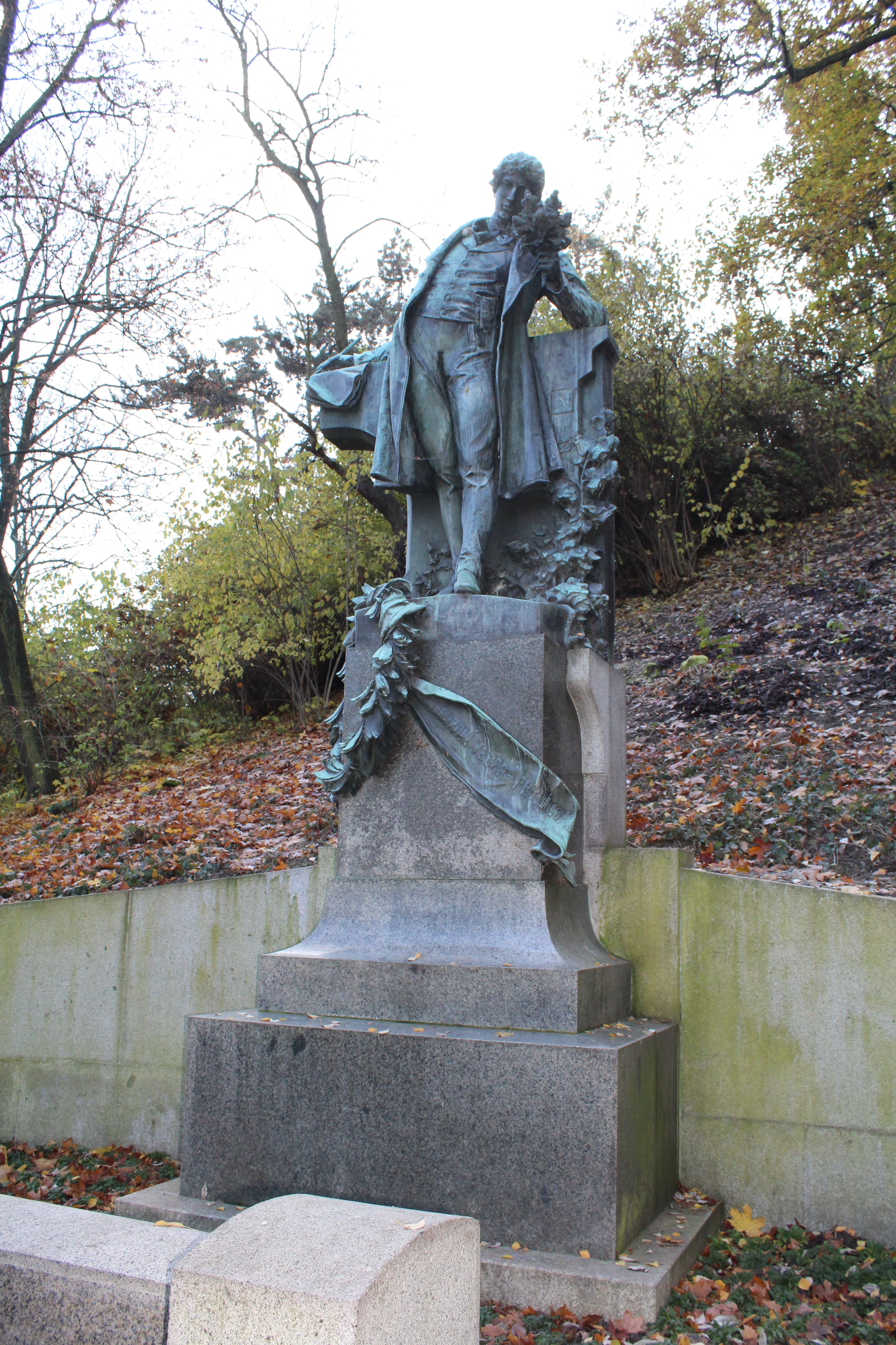 Monument en l'honneur de Karel Hynek Mácha à Prague.